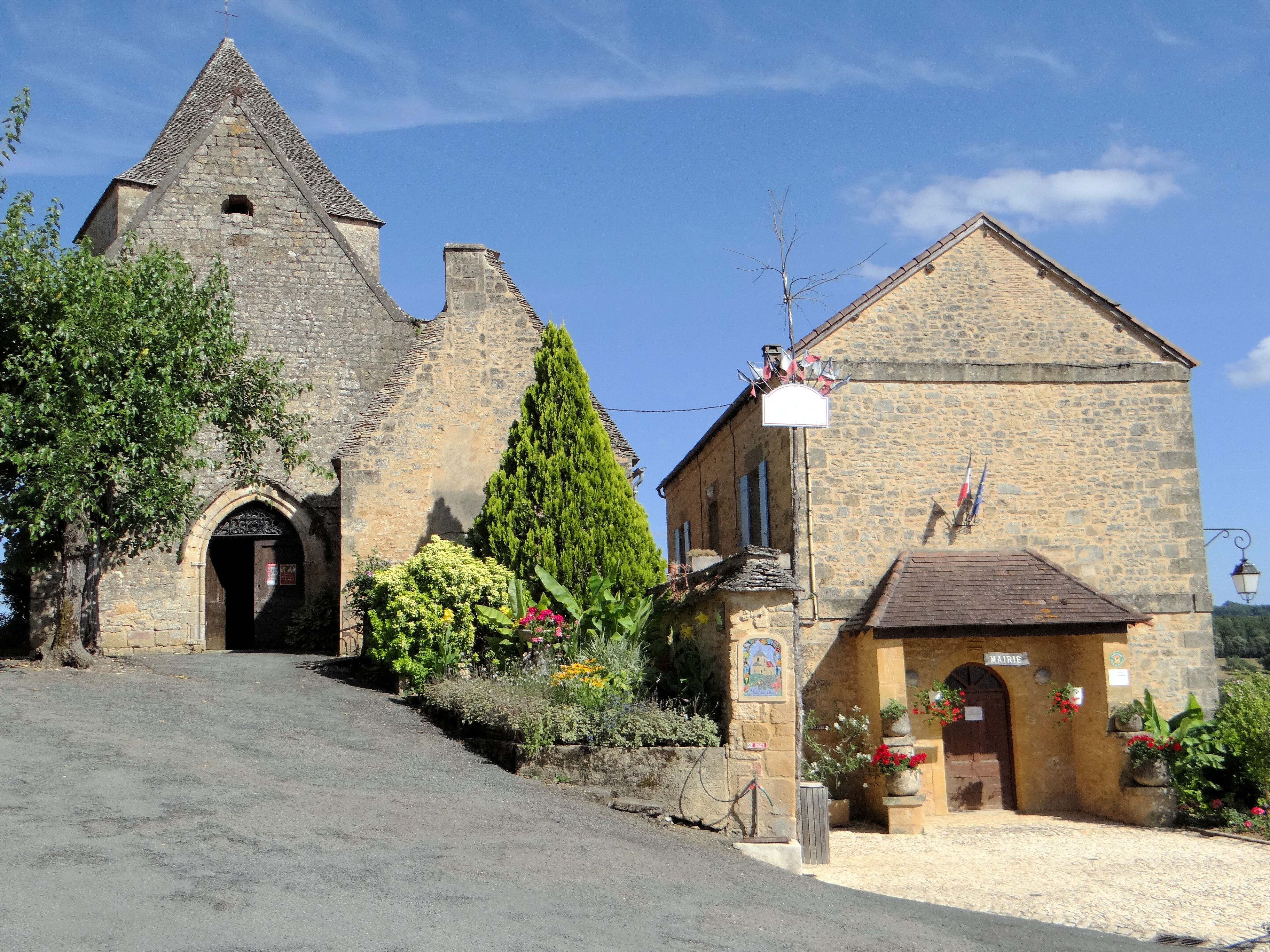 Tamniès - L'église, le petit musée de la préhistoire et la mairie